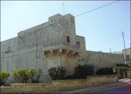 Castello Lanzun na Maltě